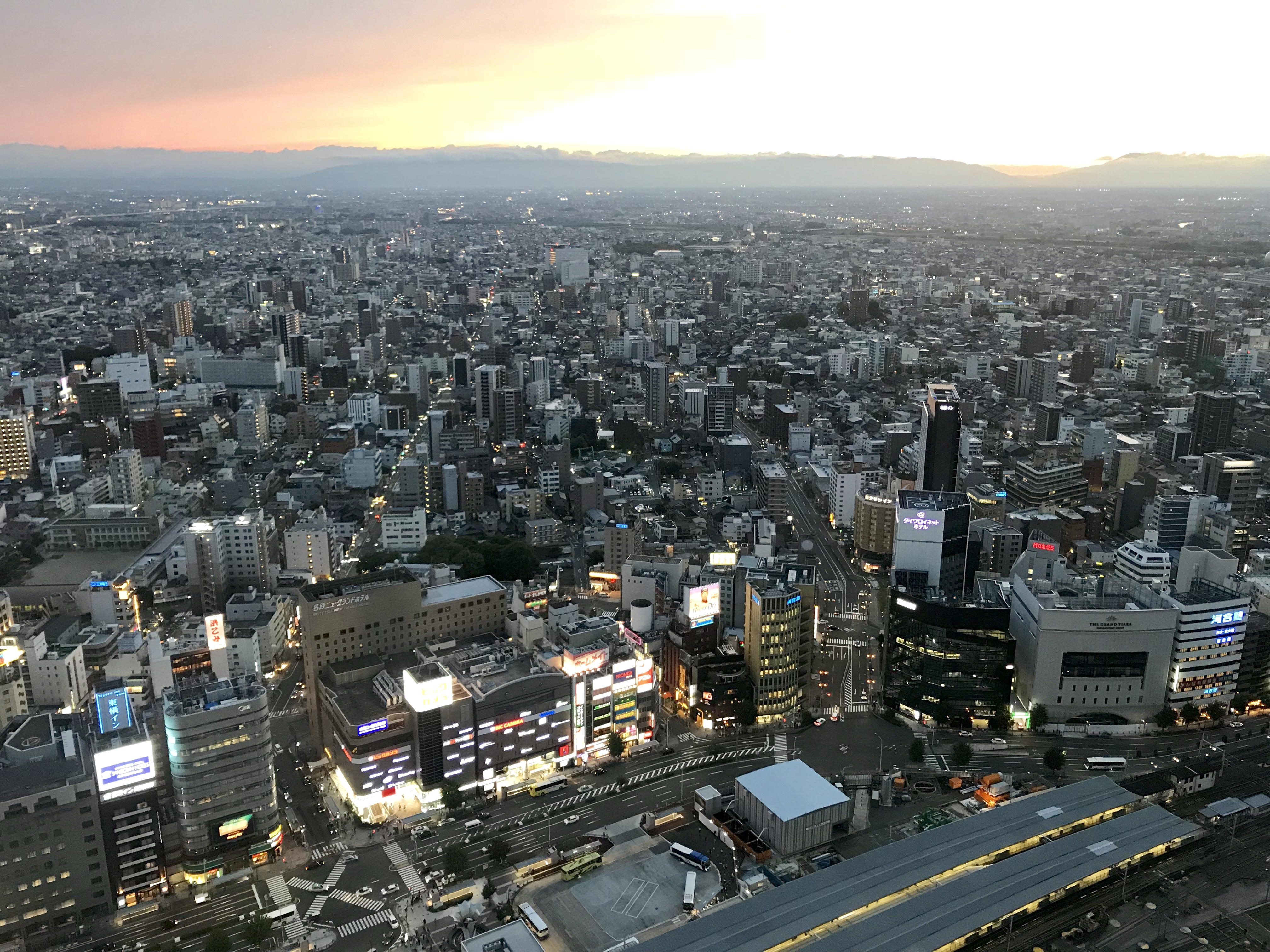 Nakamura-Ku, Nagoya, Japani, kesäkuuta 2018